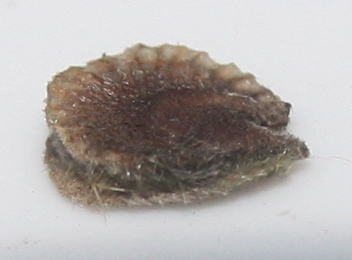 Samen einer Stockrose